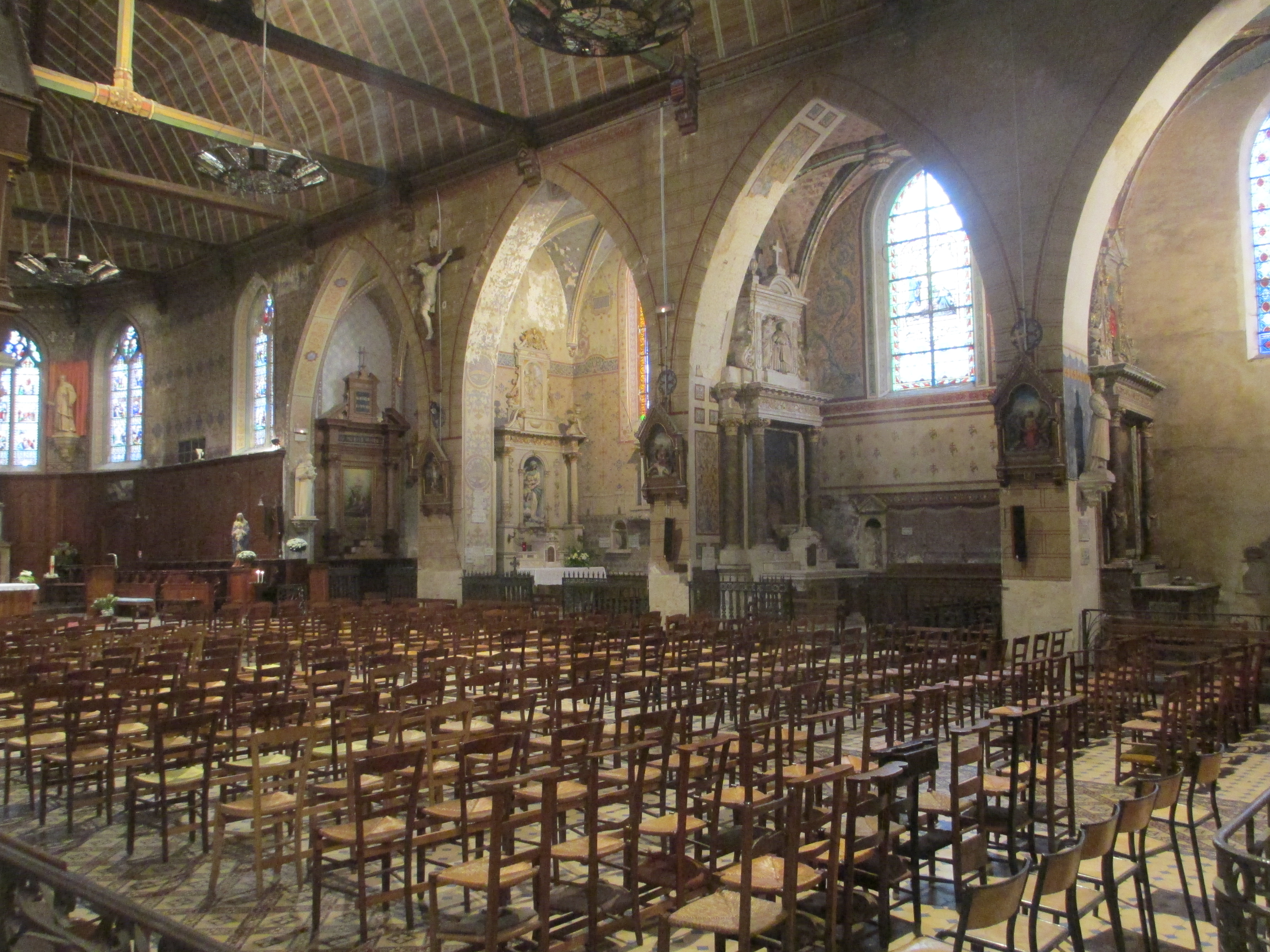 Nef de l'église Saint-Sauveur de Bellême et les chapelles latérales méridionales.